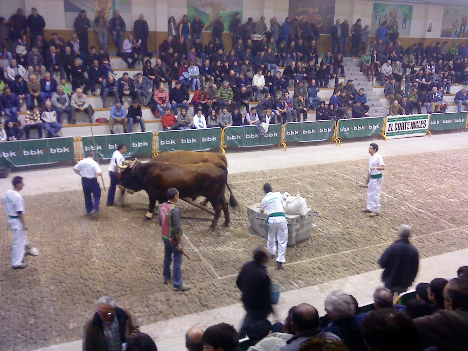 Prueba de arrastre de piedra en Abadiño (Bizkaia) en la feria de San Blas de el año 2011.